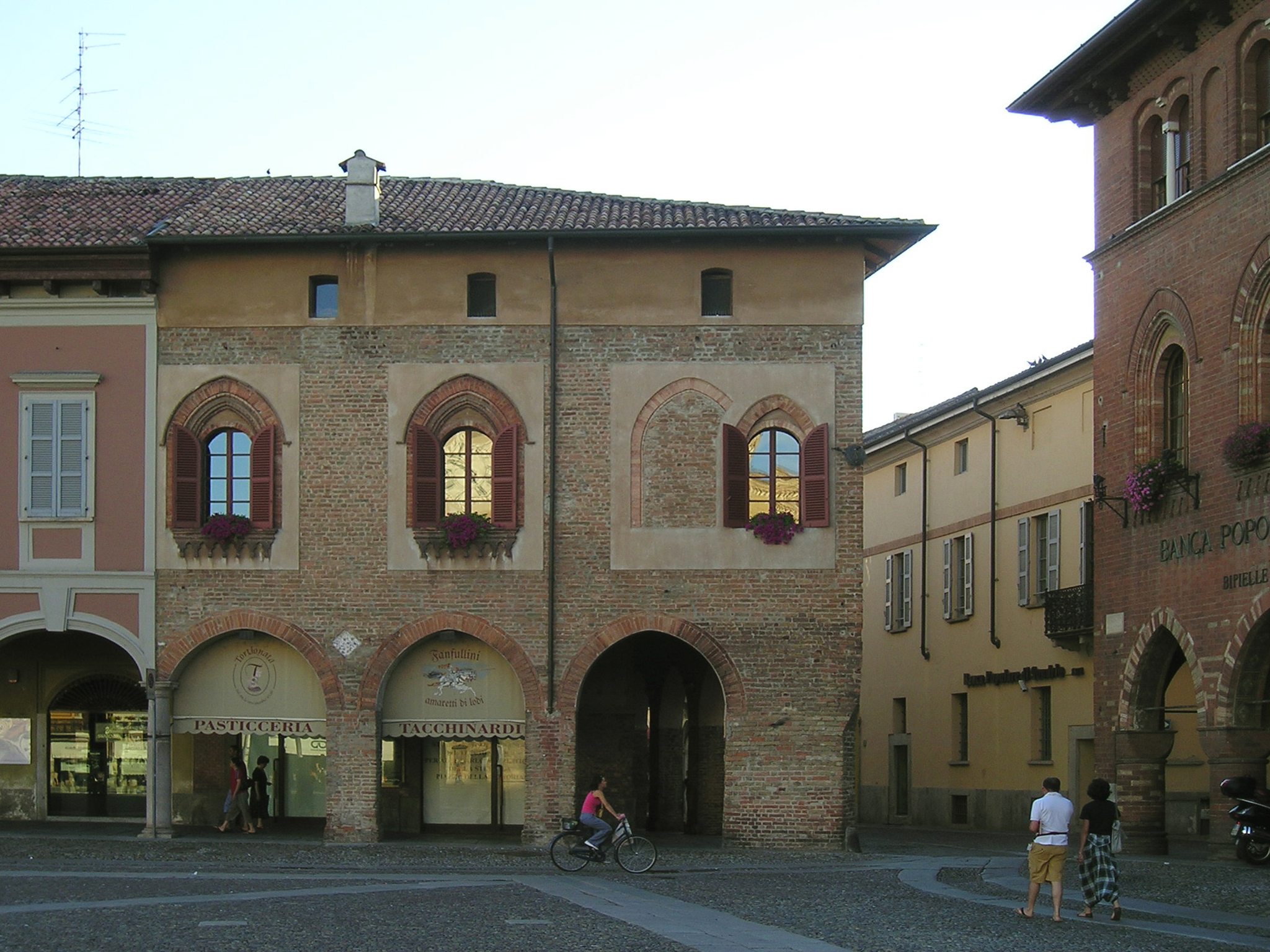 Palazzo Vistarini in piazza della Vittoria a Lodi